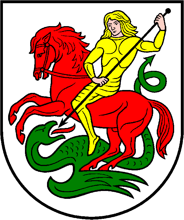 Kurklių (Anykščių r.) herbas